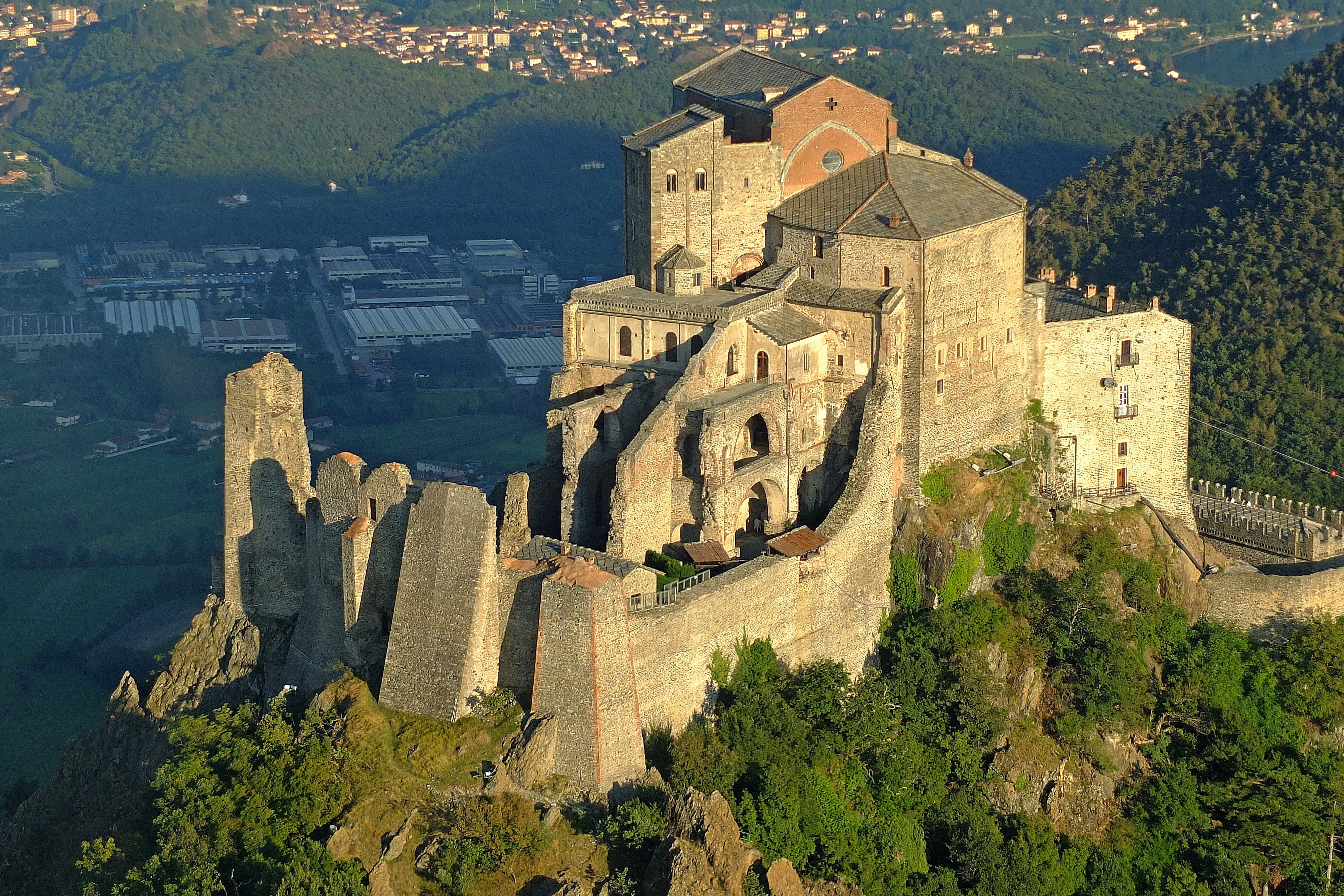 Sacra di San Michele This is a photo of a monument which is part of cultural heritage of Italy.